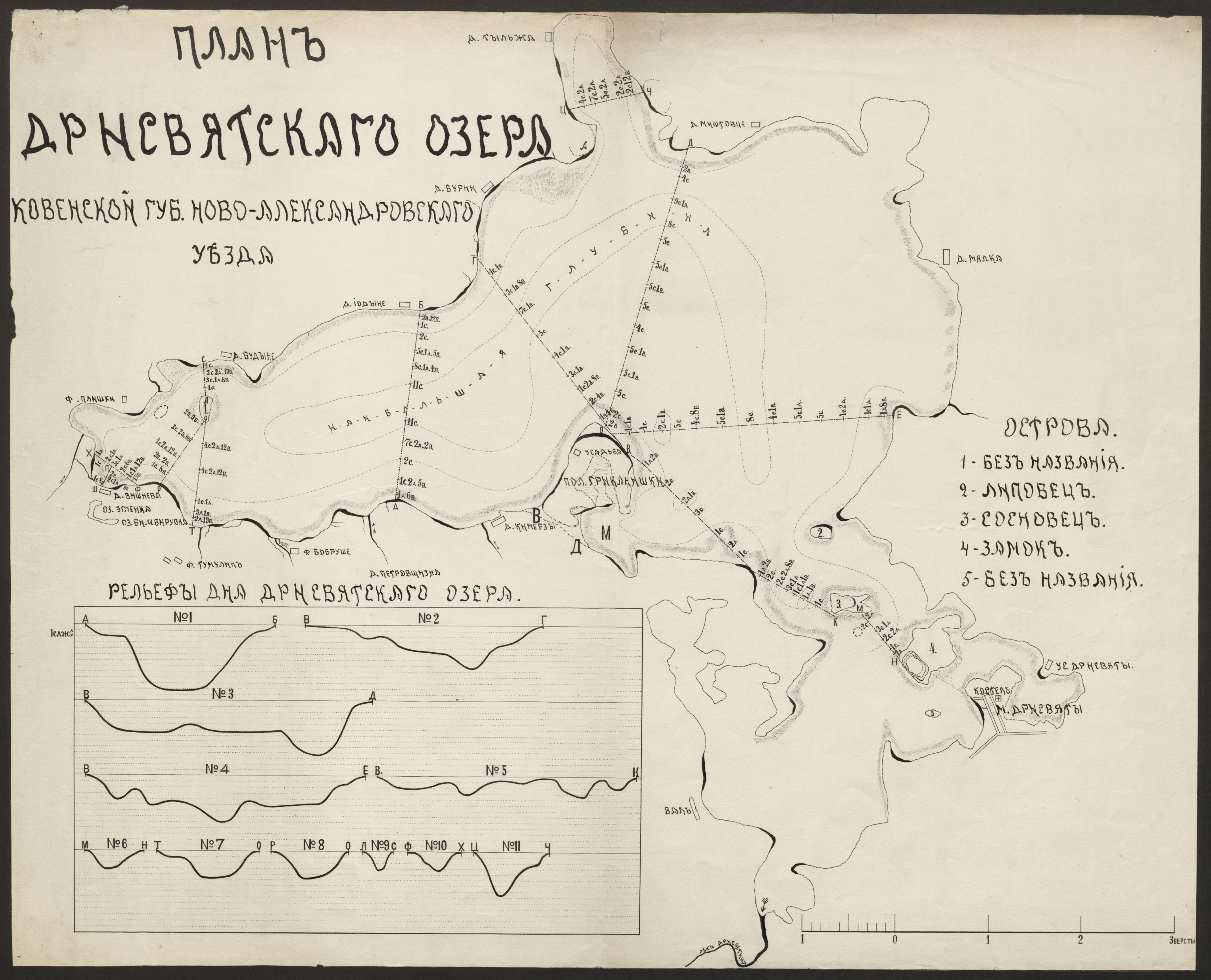 Беларуская (тарашкевіца): Возера Дрысьвяты (Dryśviaty), плян